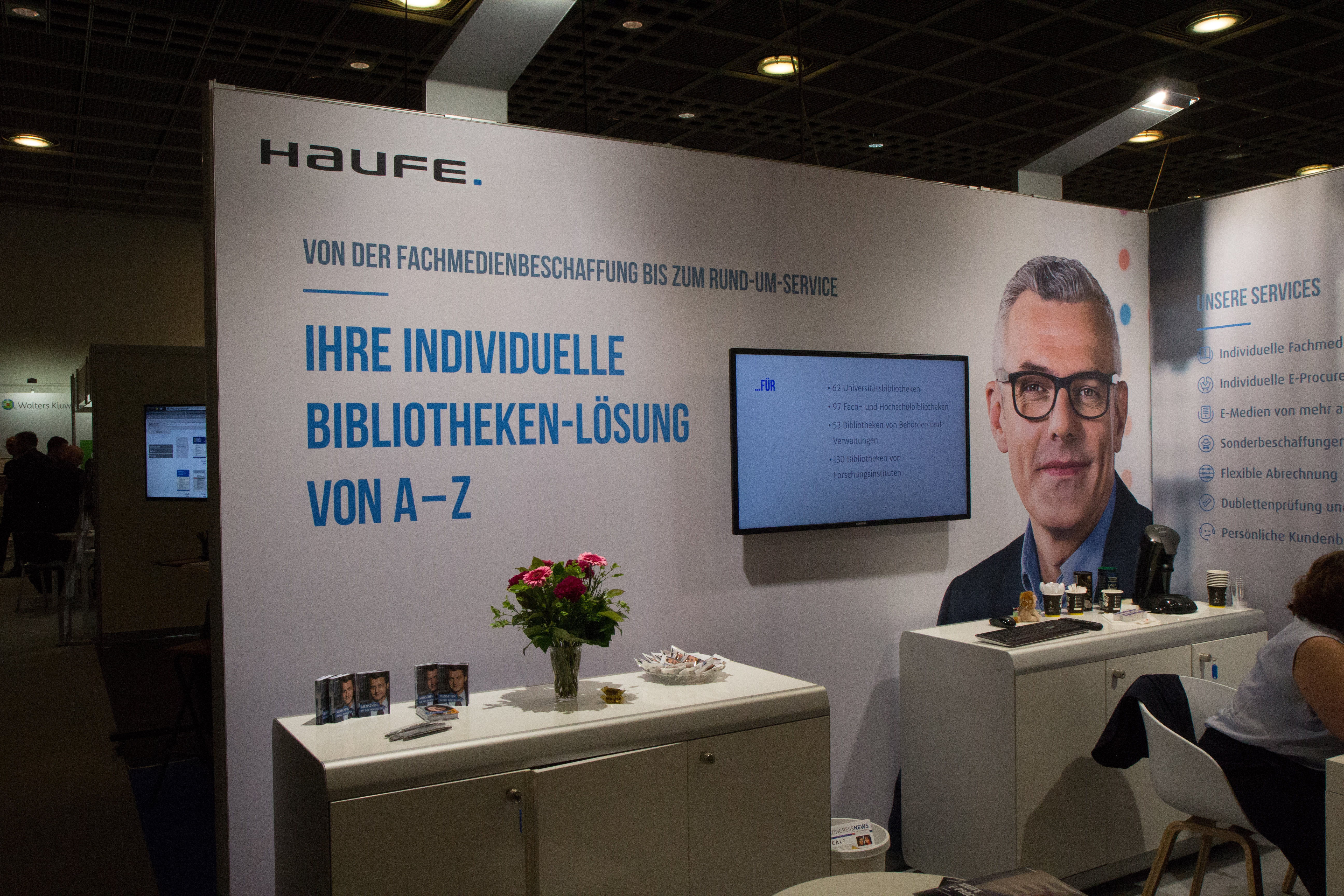 106. Deutscher Bibliothekartag in Frankfurt/Main